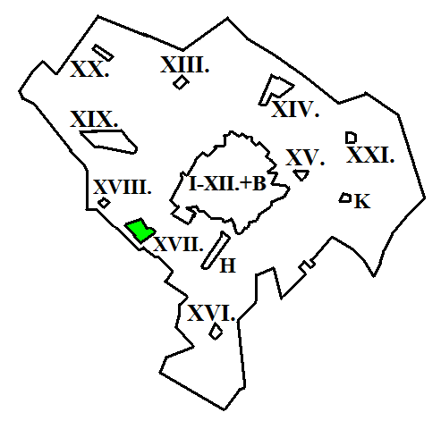 Kadafalva (XVII. kerület) elhelyezkedése Kecskeméten belül